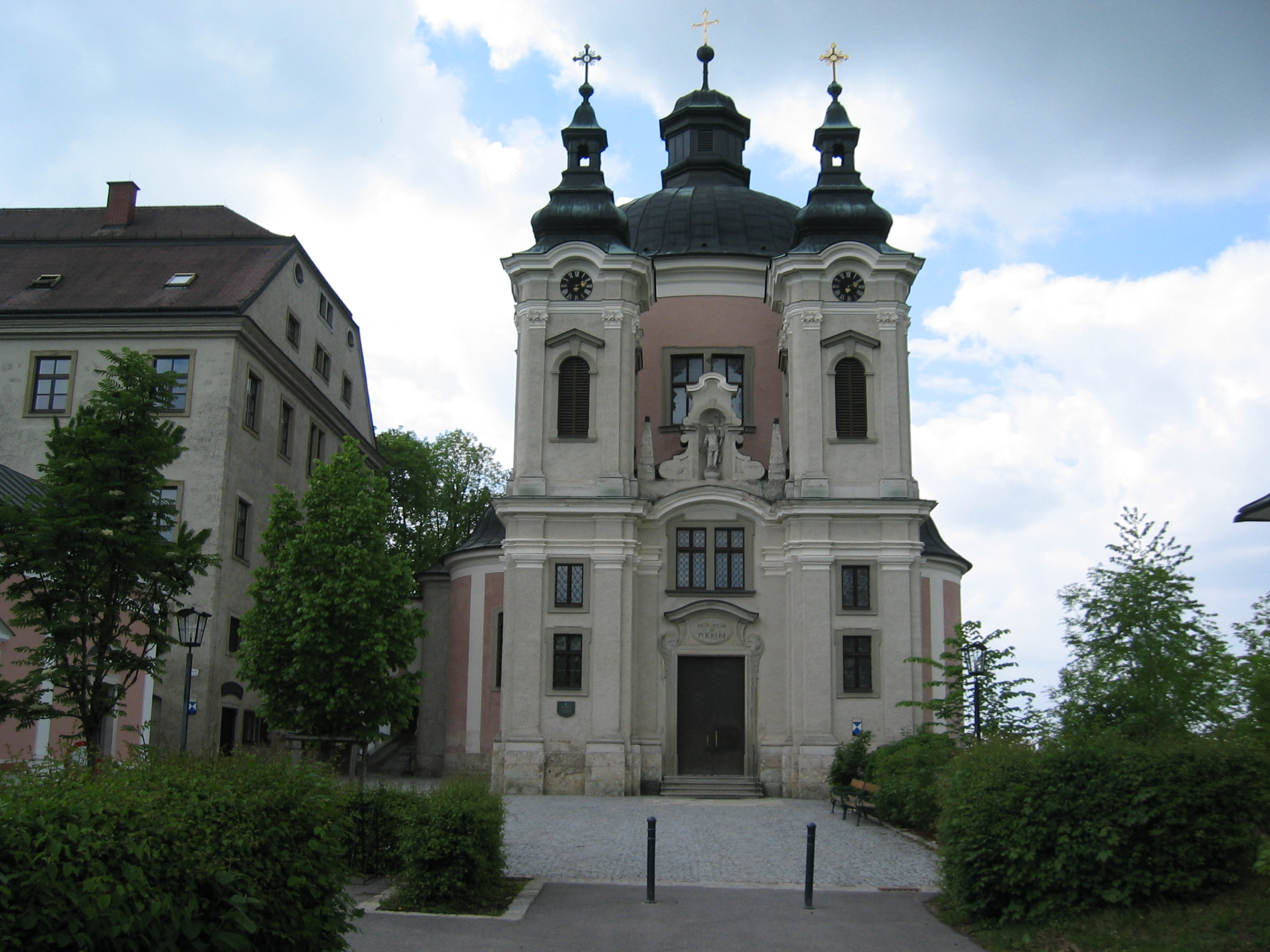 Wallfahrtskirche Christkindl bei Steyr